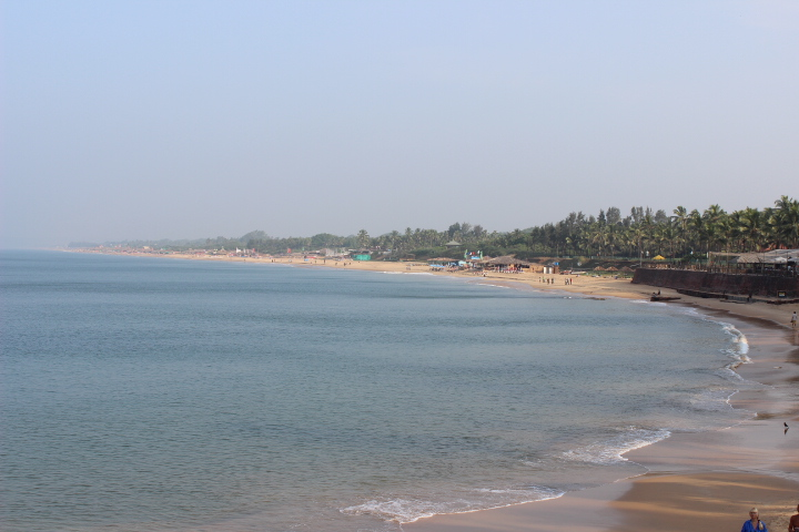 அகுடா கோட்டையில் இருந்து எடுக்கப்பட்ட கண்டோலிம் கடற்கரையின் புகைப்படம்